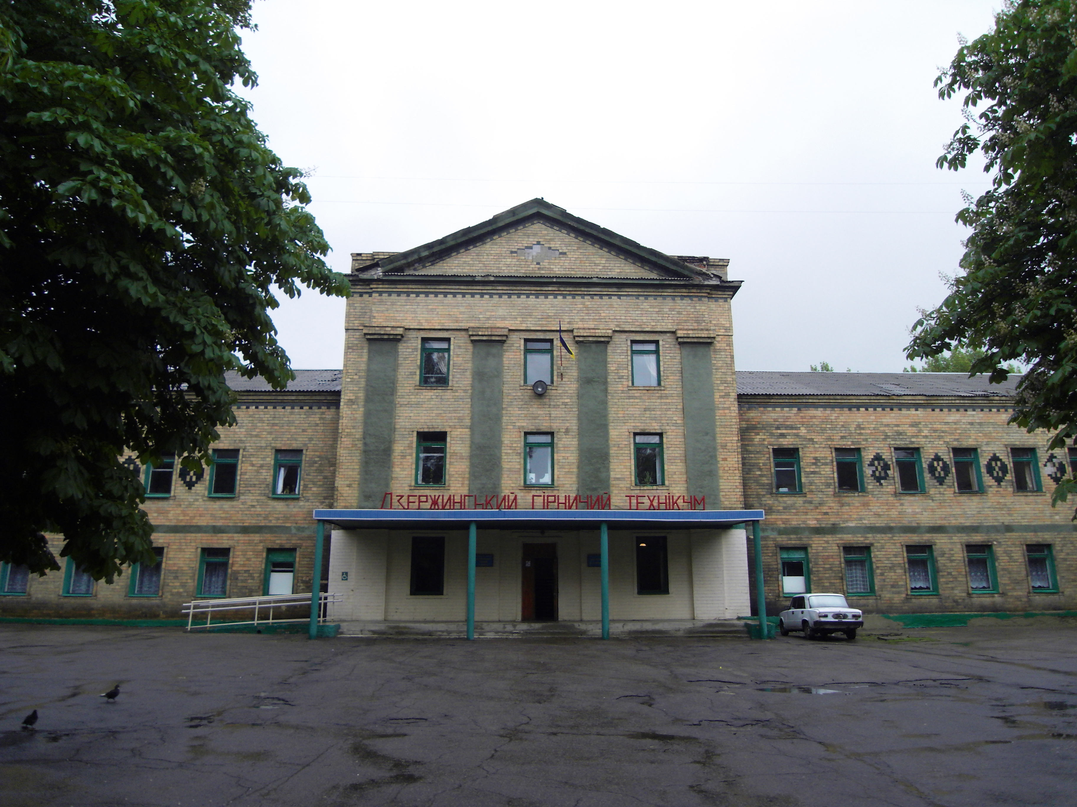 Дзержинський гірничий технікум